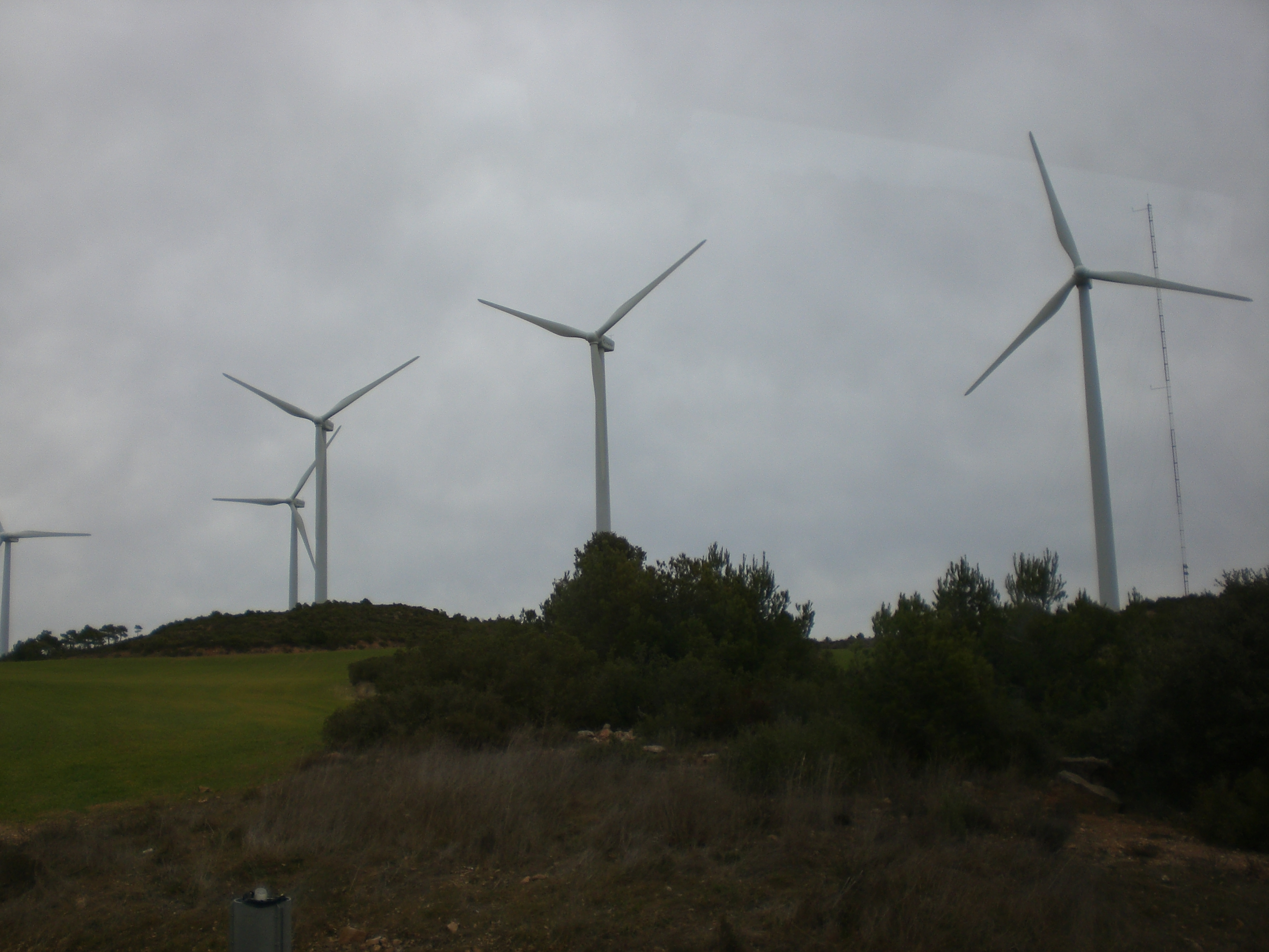 Aerogeneradores del parque eolico de Rubió, Cataluña